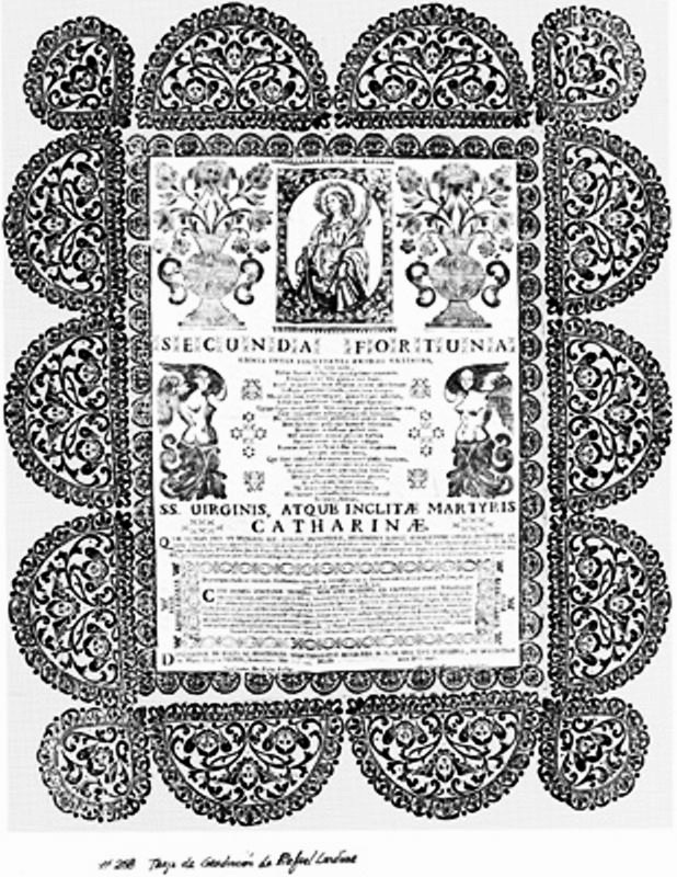 Tarja de graduación de Rafael Landívar del colegio San Borja en 1746. Tiene una estampa de Santa Catalina.